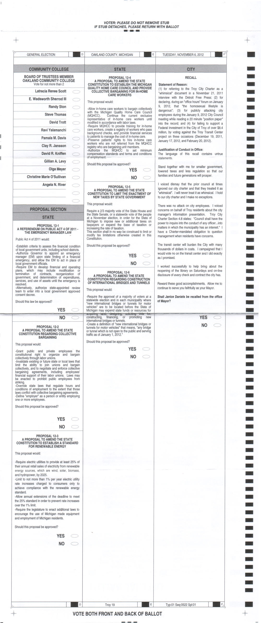 Rückseiteseite des Stimmzettels zur „General Election 2012“ am 6. November 2012 in Troy (19. Wahlbezirk)